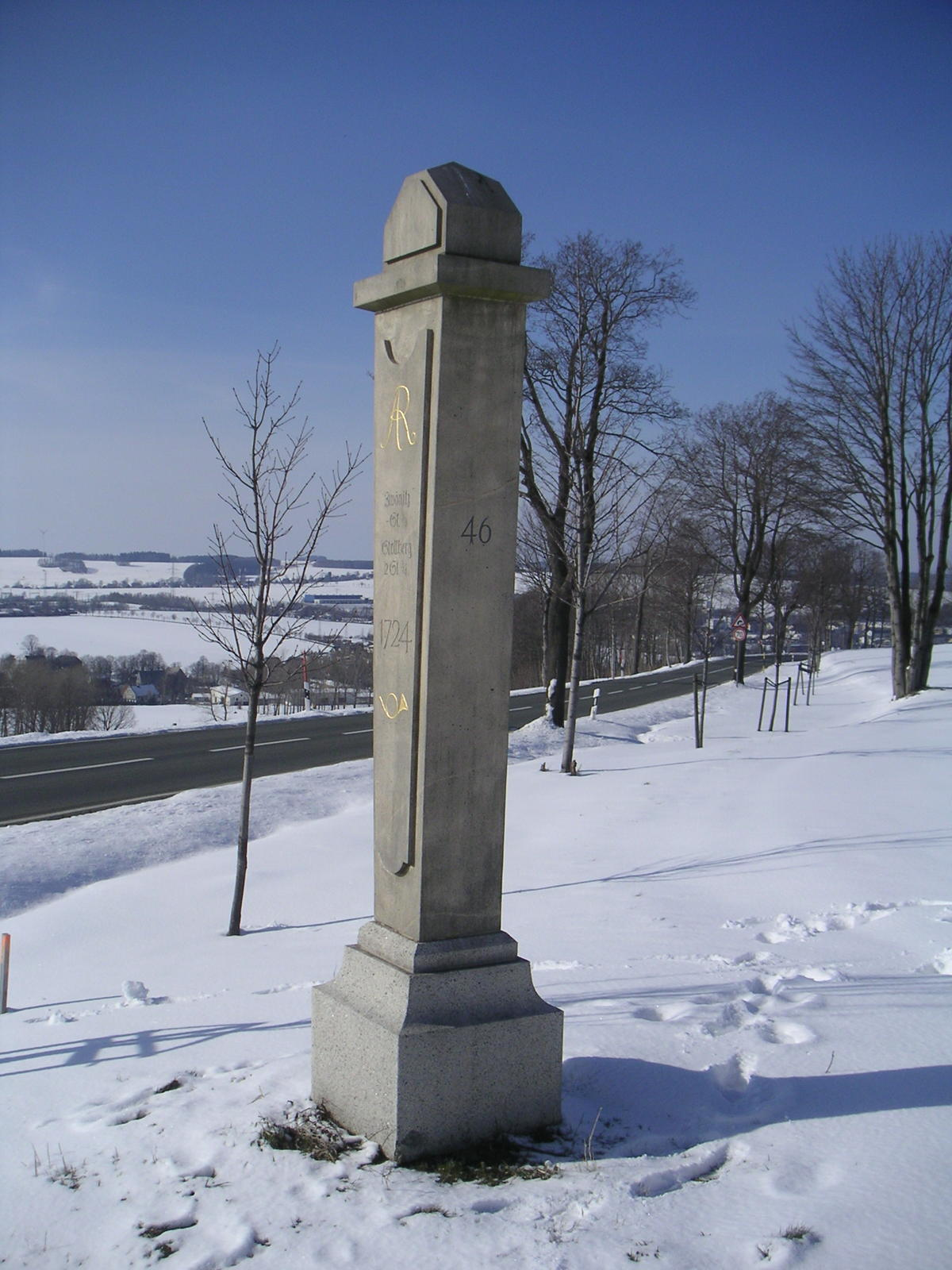 Halbmeilensäule (1724) Nr. 46 an der Staatsstraße 270 (Grünhain - Zwönitz) bei Zwönitz